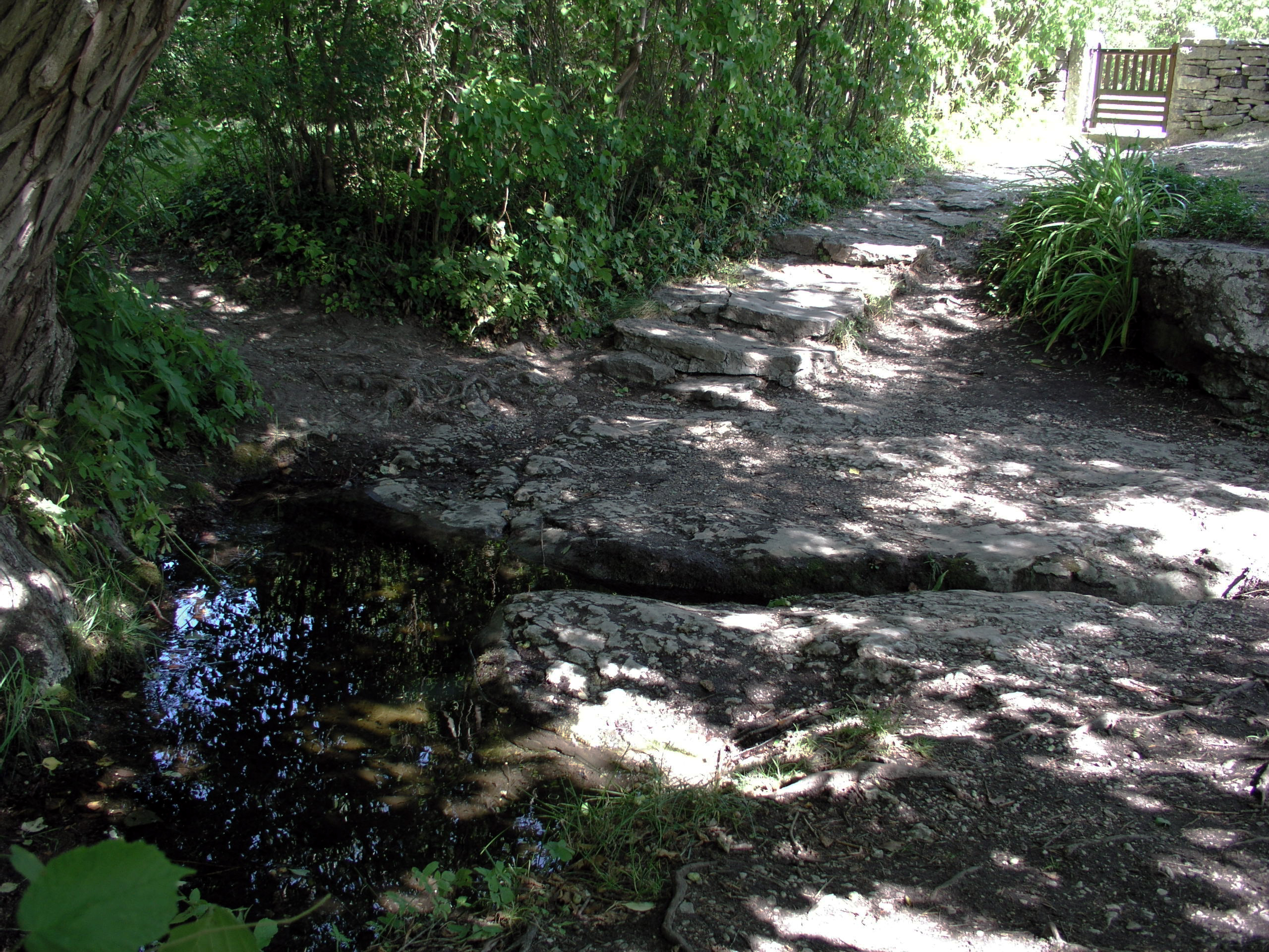 Hångers källa, cold water well, Lärbro, Gotland, Sweden